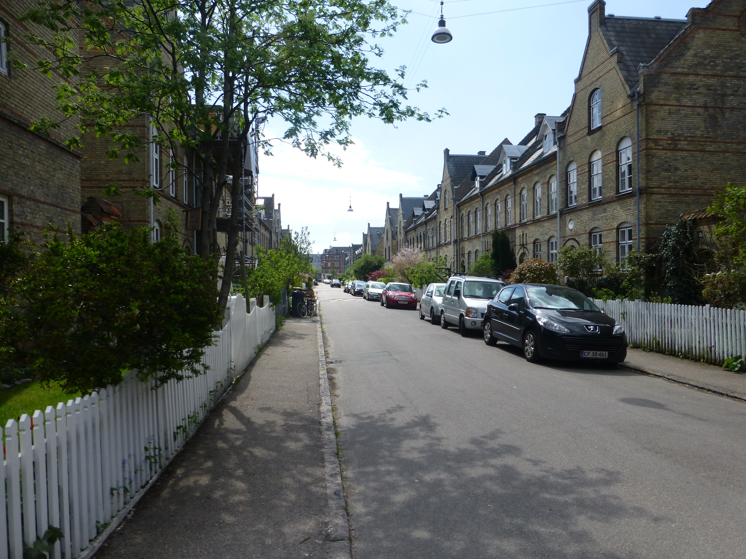 The street Heisesgade in Østerbro in Copenhagen.